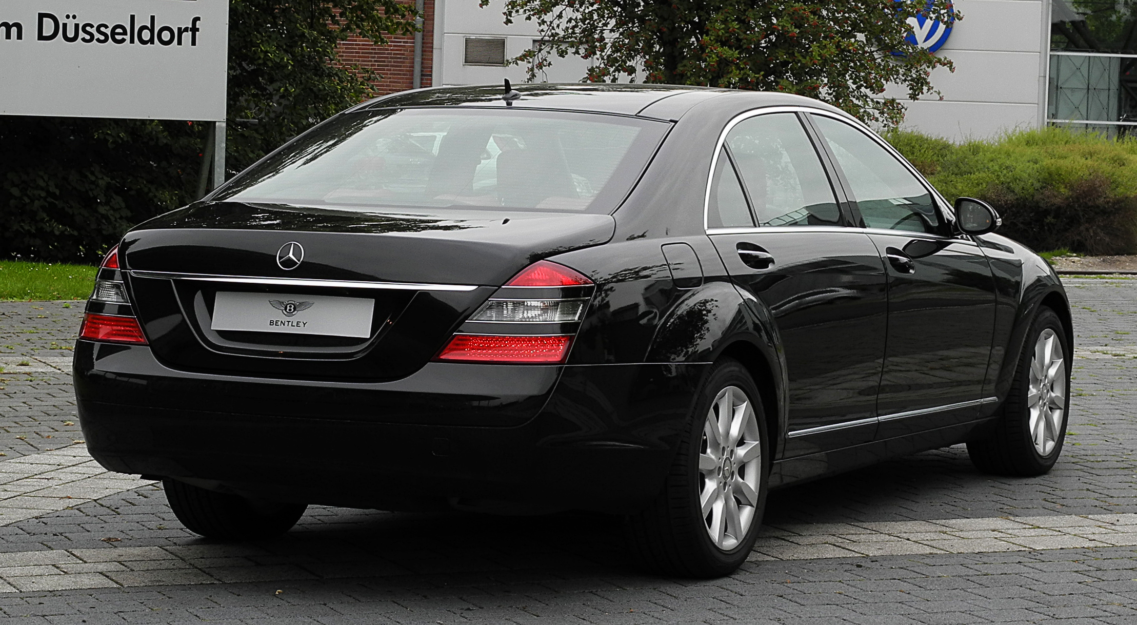 Mercedes-Benz S 320 CDI 4MATIC L (V 221)